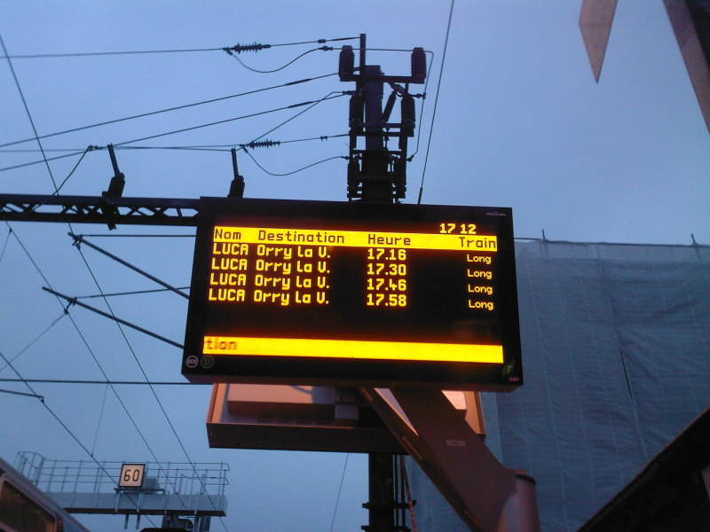 Écran d'Infogare de la voie 1 de la gare de Goussainville